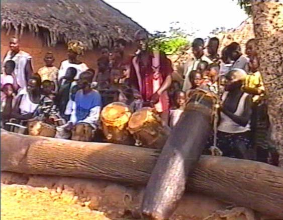 Image en format jpeg